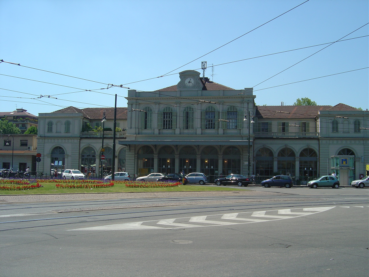 Porta Susa